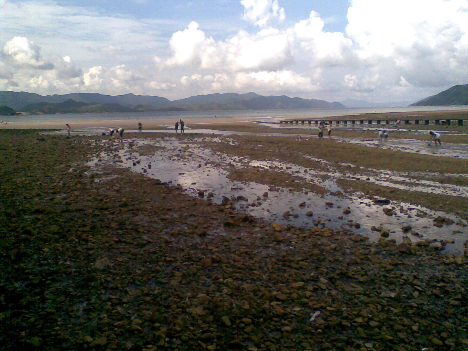 退潮的泥涌石灘